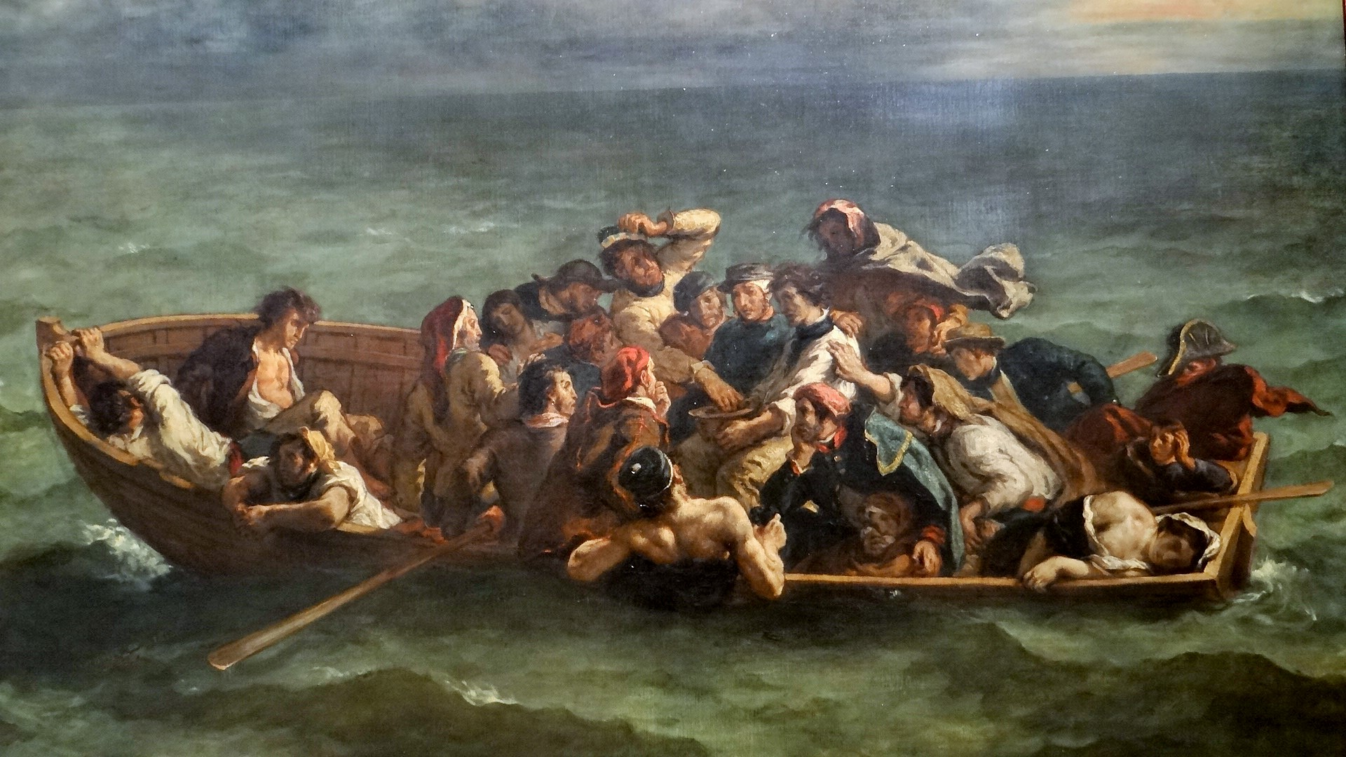 Le naufrage de Don Juan, huile sur toile, 1840, Slaon de 1840, Eugène Delacroix Musée du Louvre